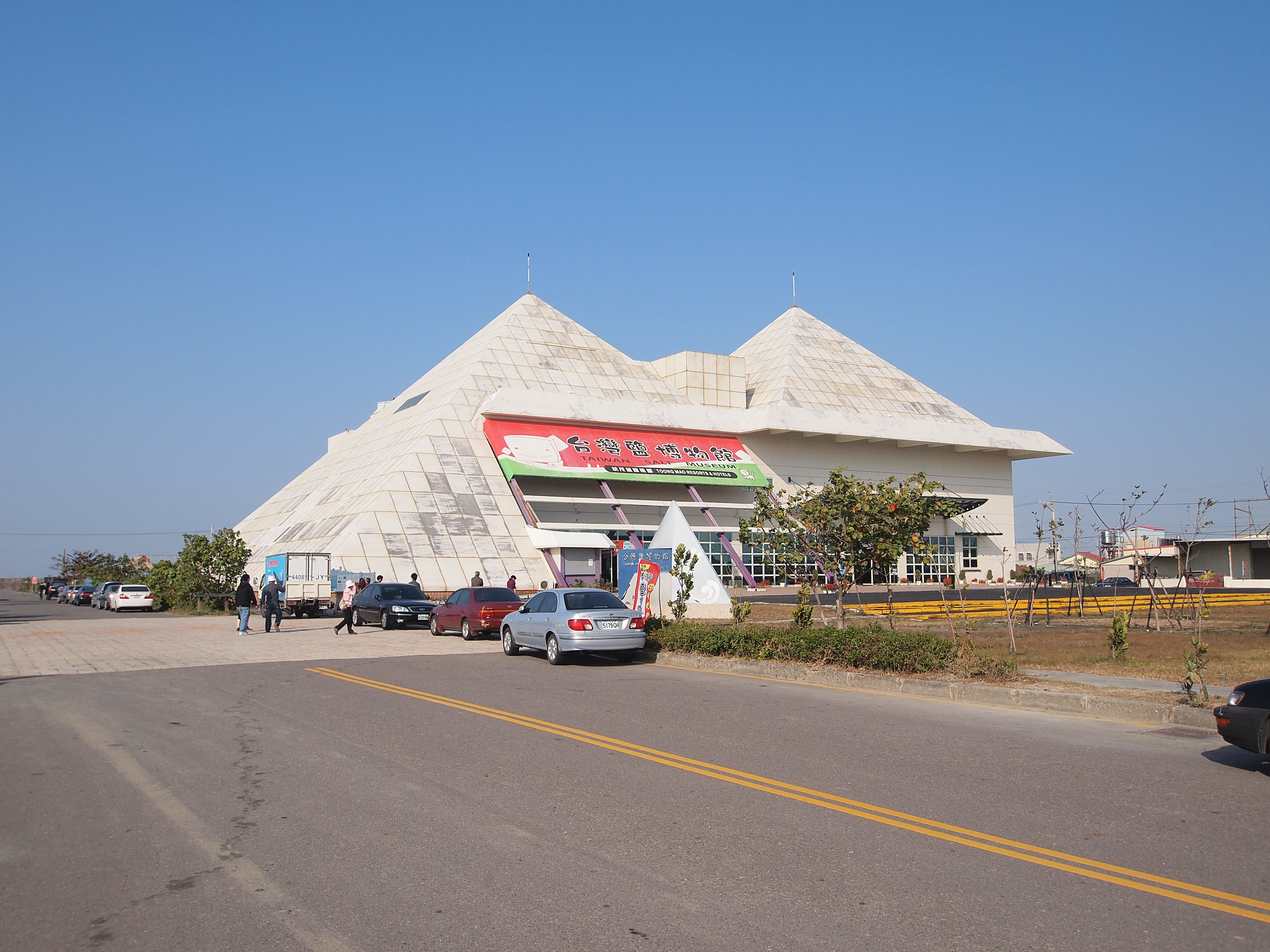 台湾盐博物馆 - Taiwan Salt Museum - 2012.02